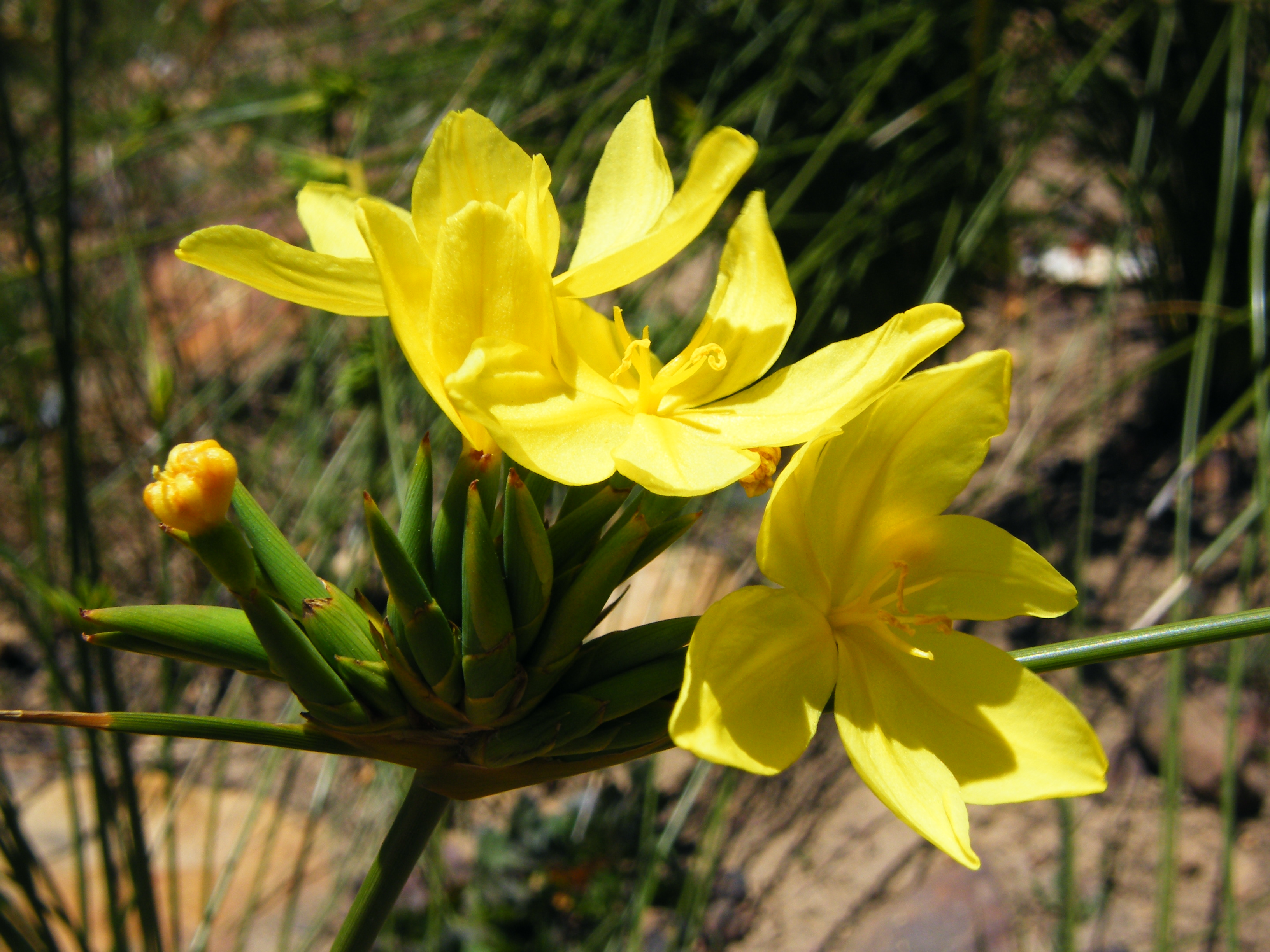 Biesrooi